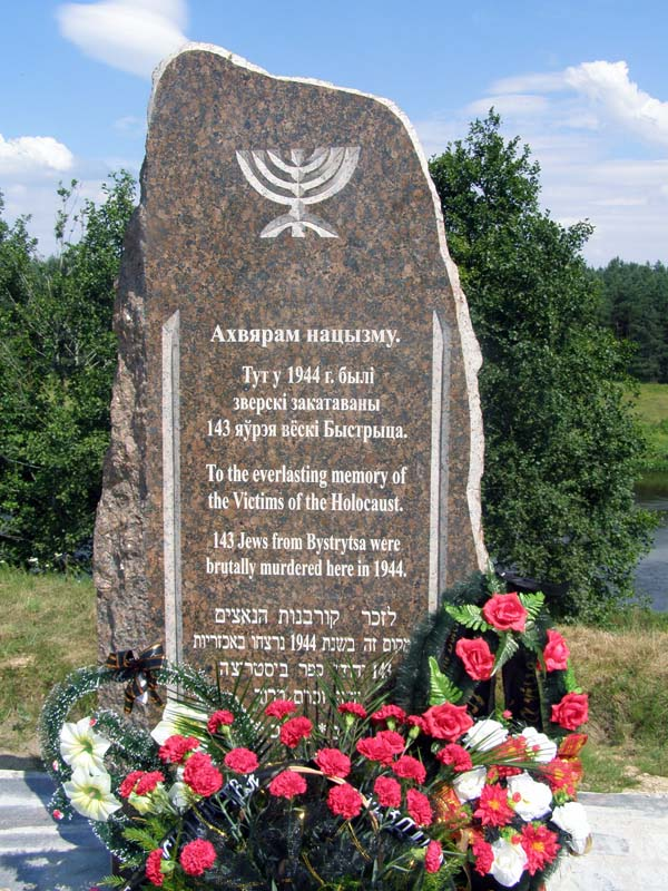 Памятник евреям деревни Быстрица Островецкого района Гродненской области, убитым нацистами во время Холокоста. Установлен в 2010 году.